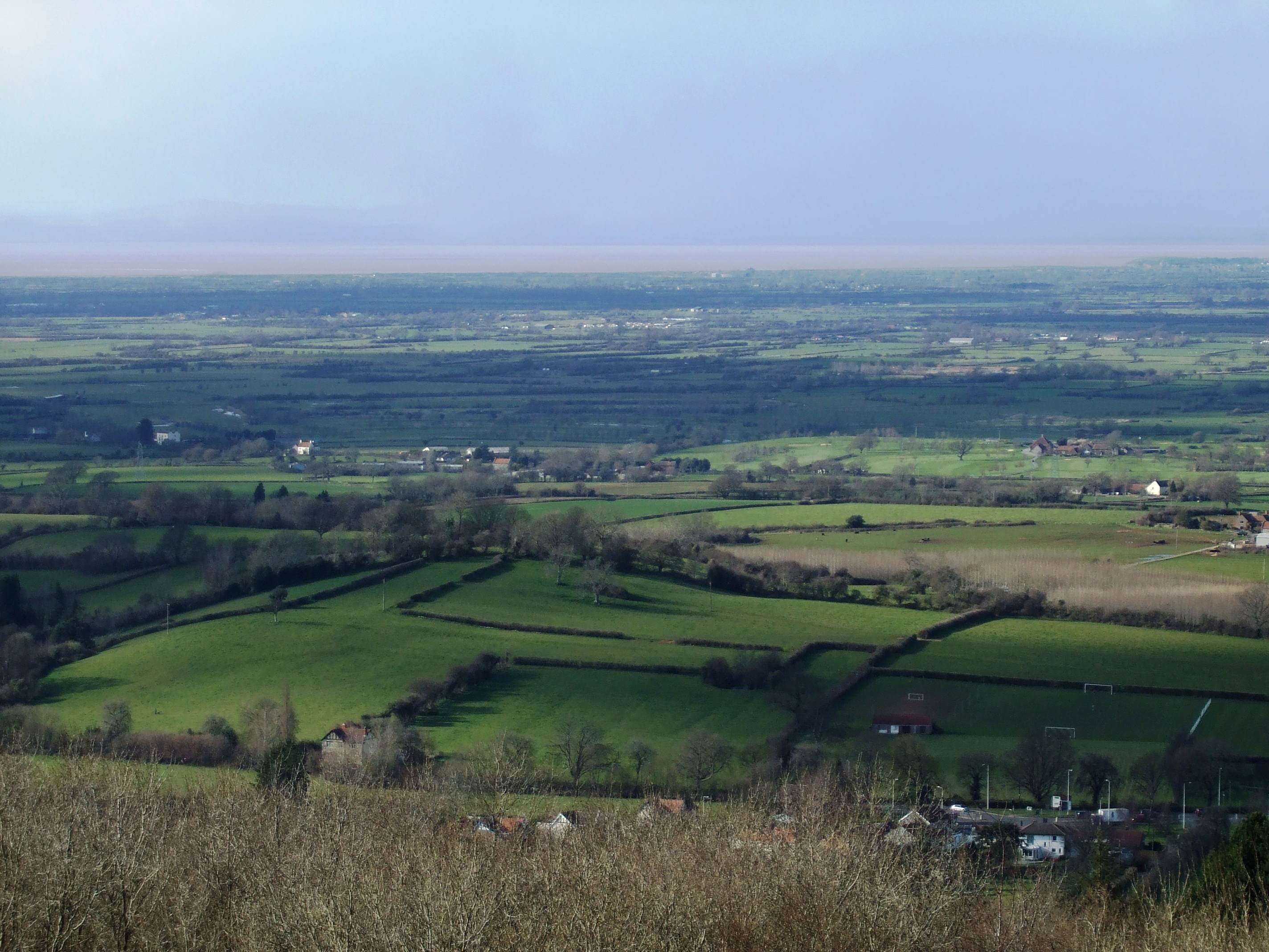 North Somerset Levels taken from Dolebury Warren